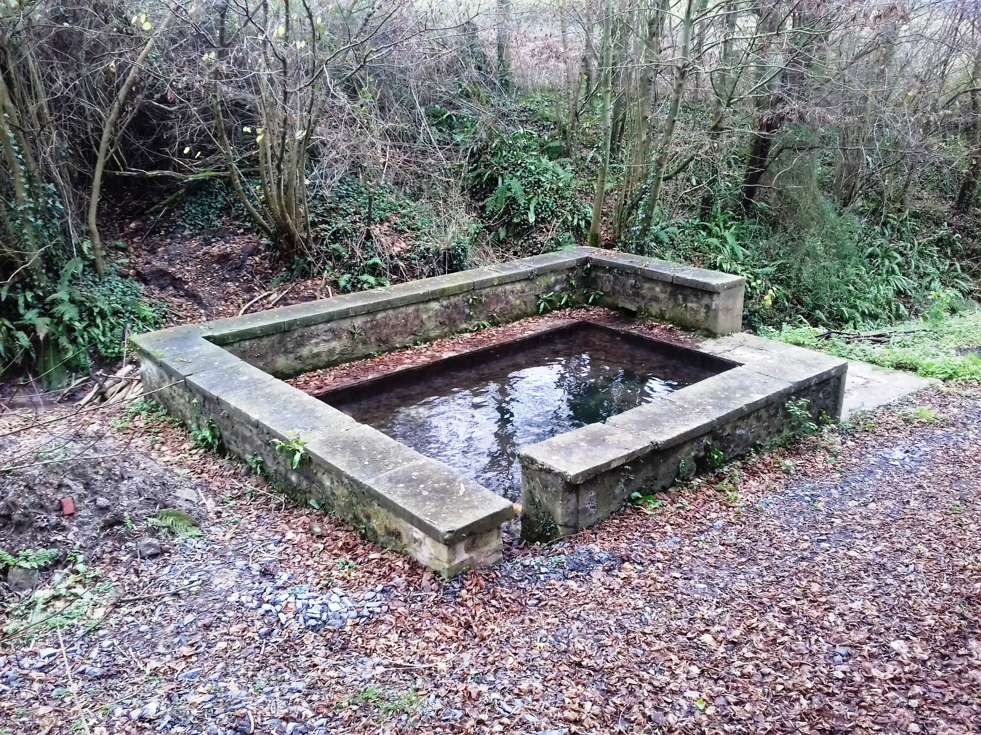 Neuilly-la-forêt Lavoir de la Pissote